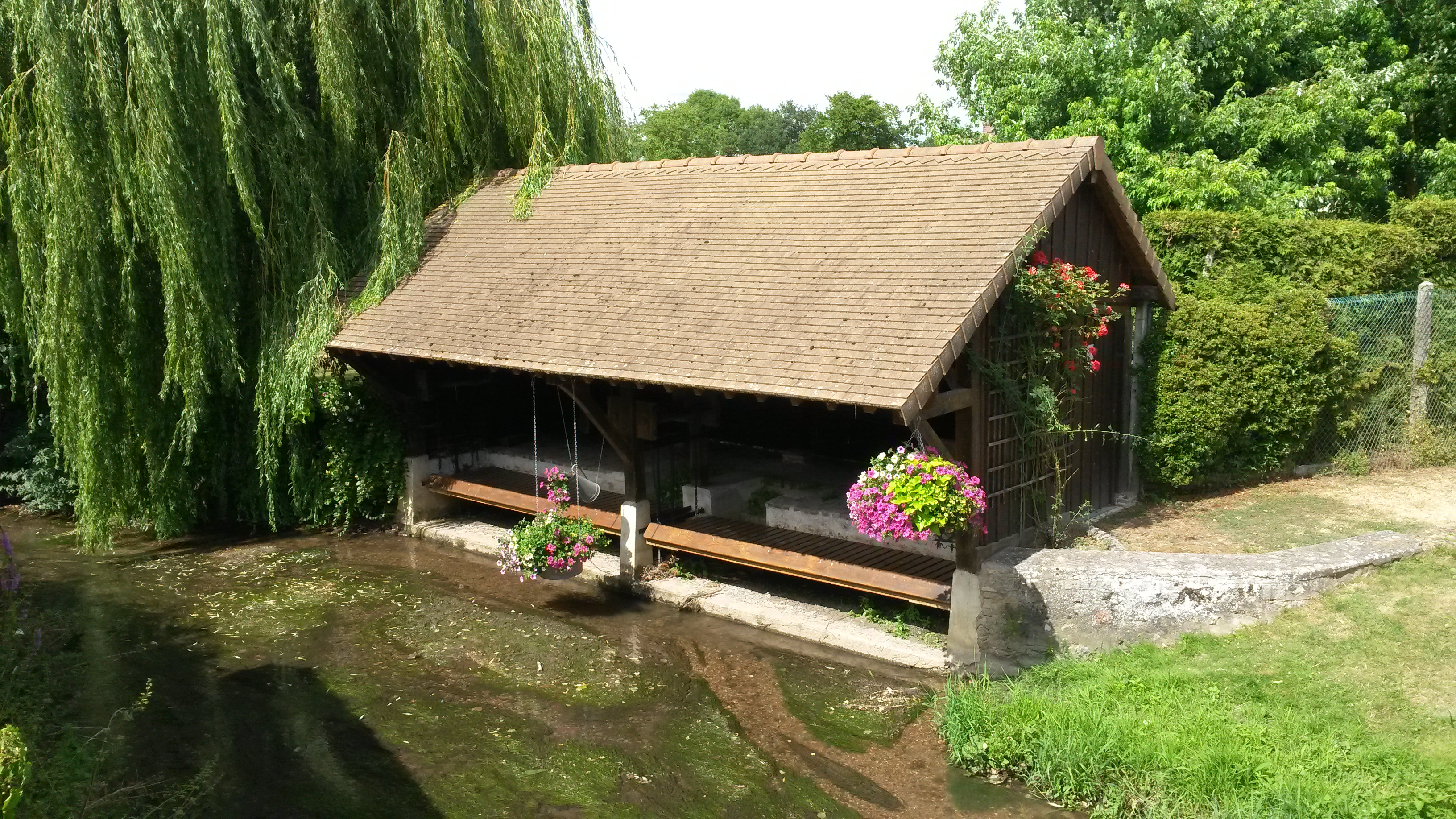 Ancien lavoir de Croisy sur le bras Sagout.